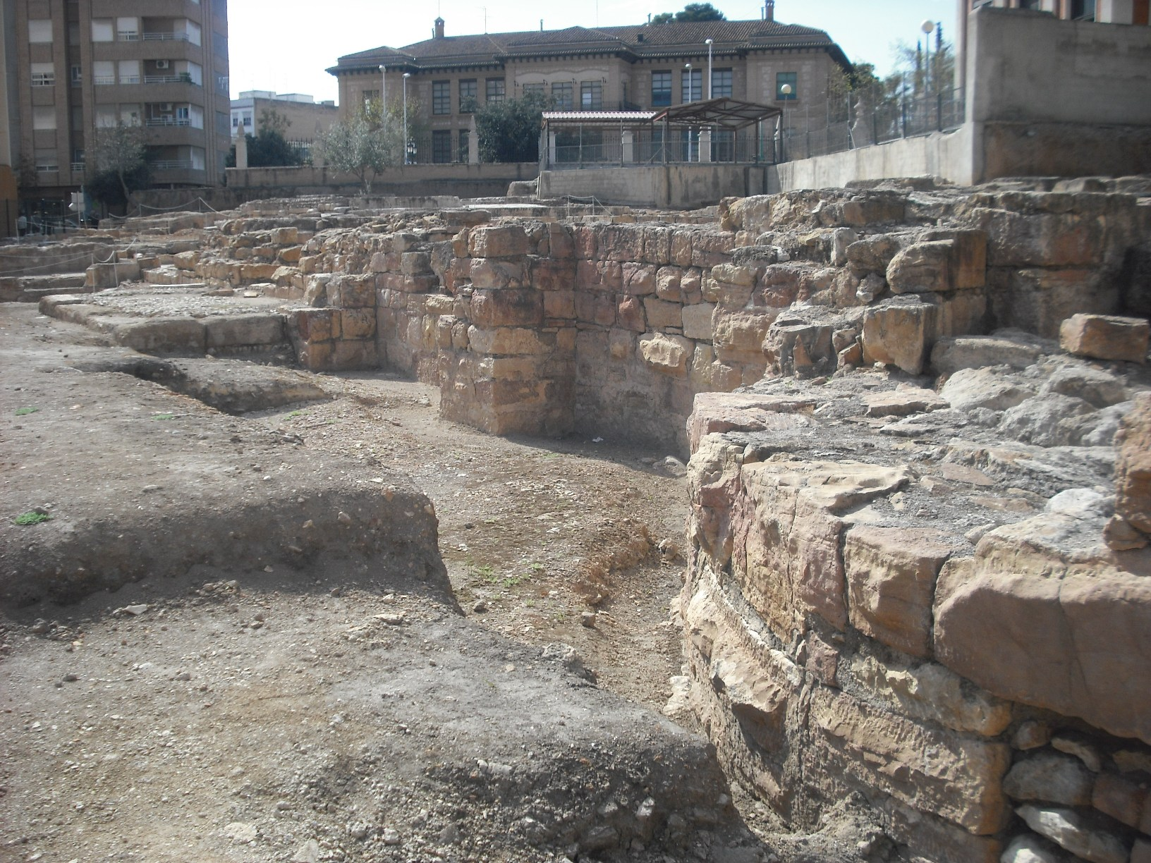 Vista de la palestra i la secció masculina, destacant l'absis del caldarium, de les Termes de Mura (Llíria).